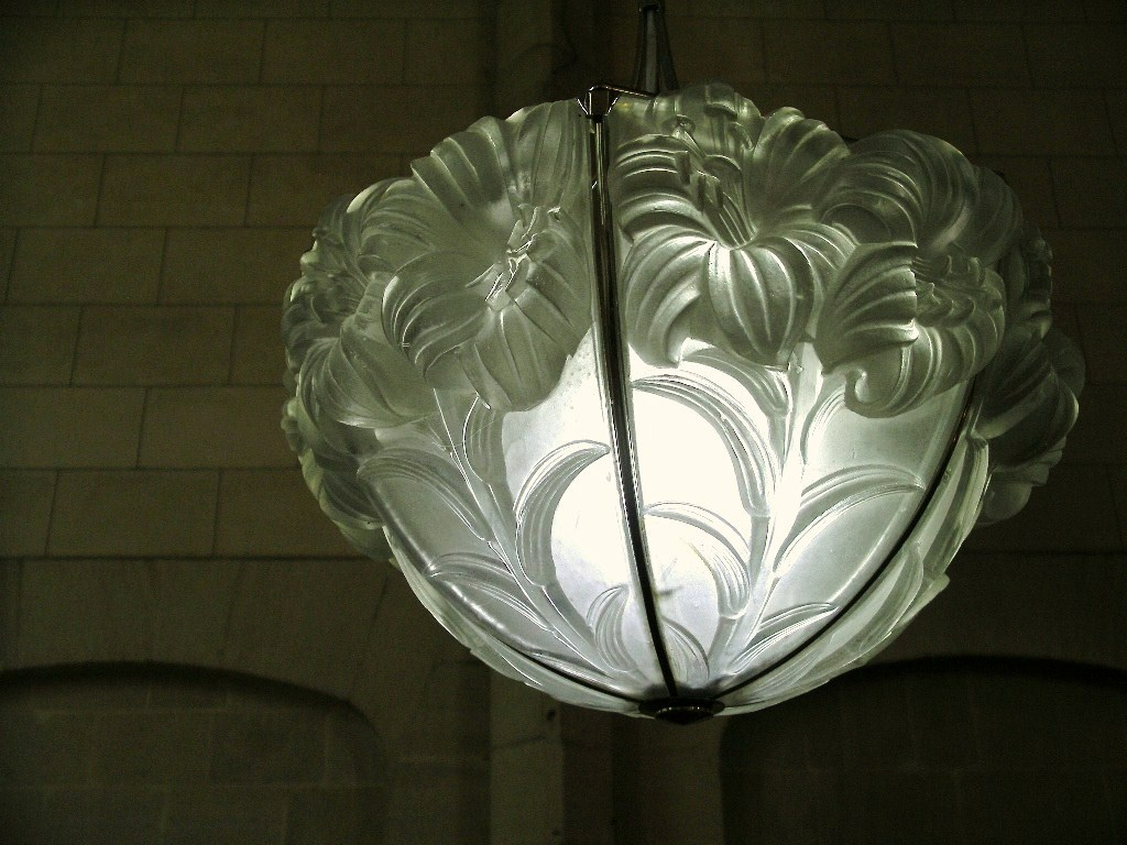 Lampe de sanctuaire réalisée par René Lalique à la Chapelle de la Vierge Fidèle à Douvres-la-Délivrande dans le Calvados (France)